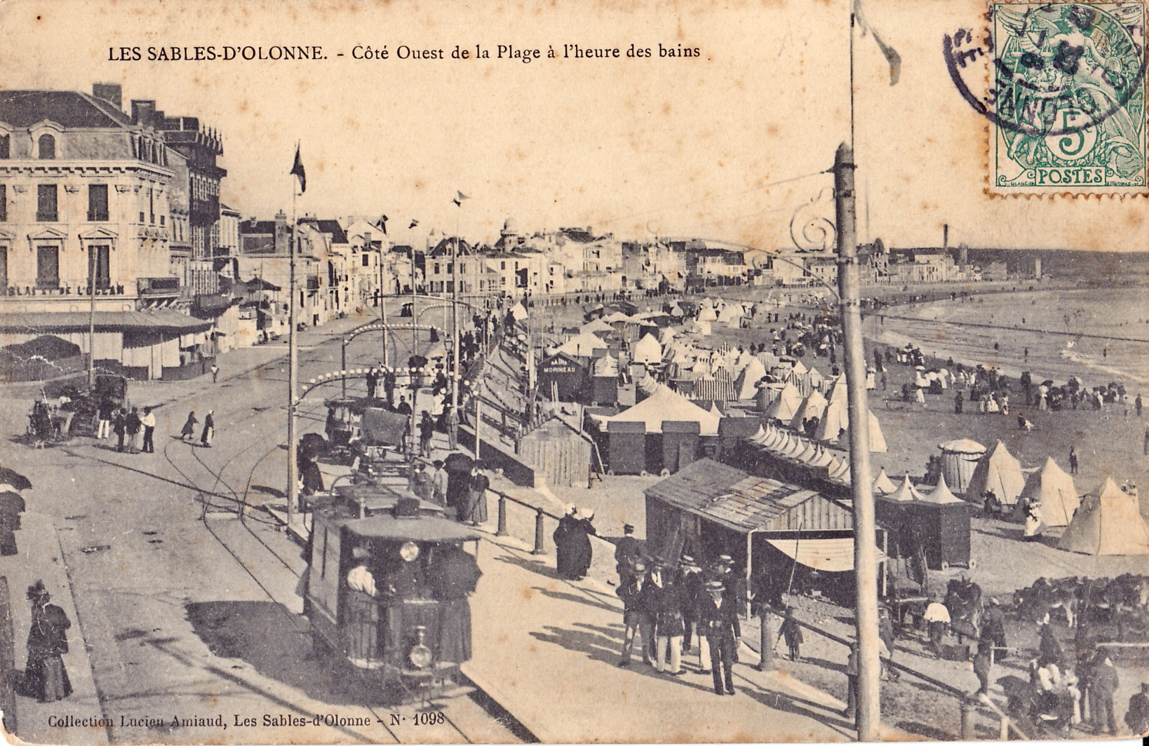 Carte postale ancienne éditée par Lucien Amiaud aux Sables d'Olonne, n°1098 : LES SABLES-D'OLONNE - Côté Ouest de la Plage à l'heure des bains